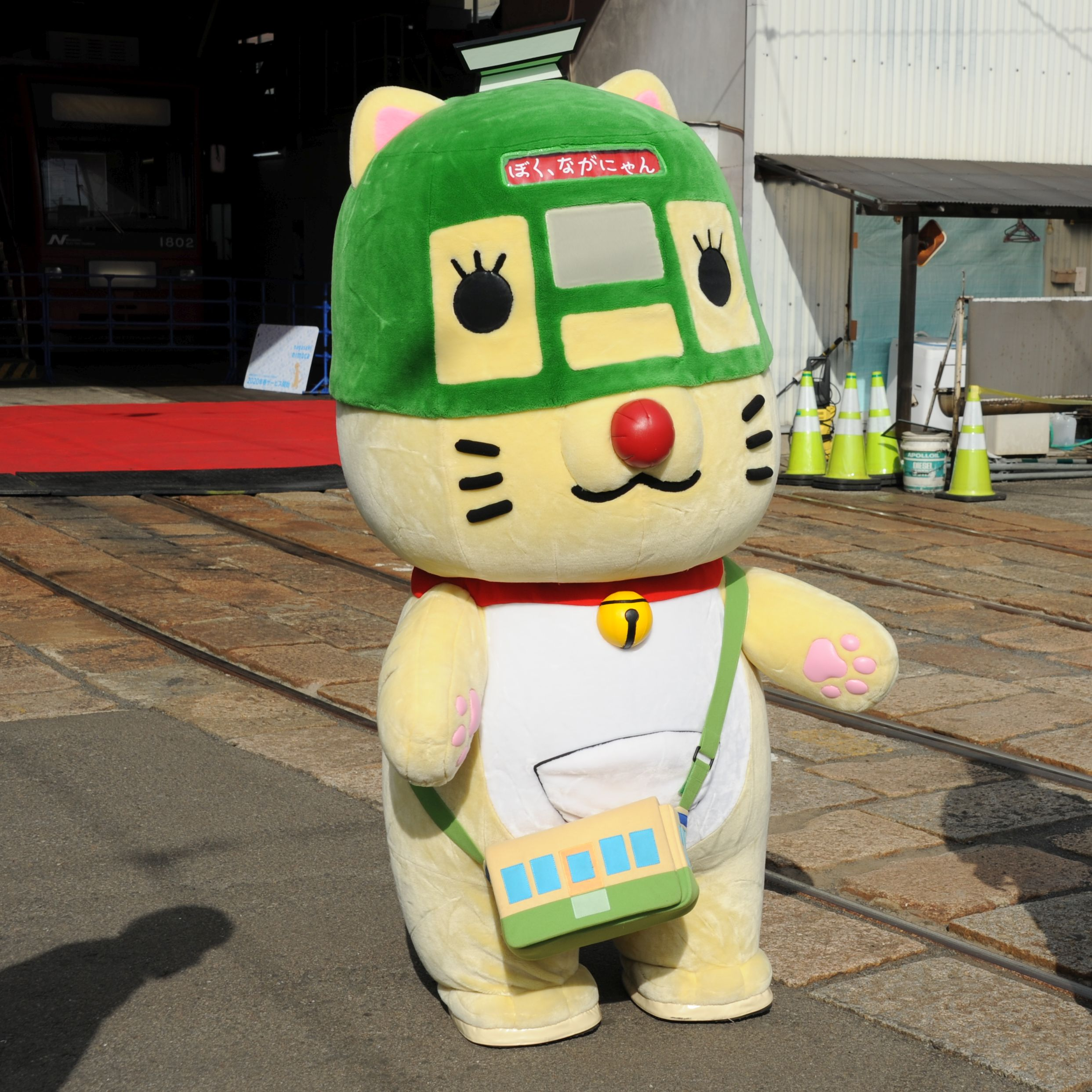 長崎電気軌道のマスコットキャラクター「ながにゃん」